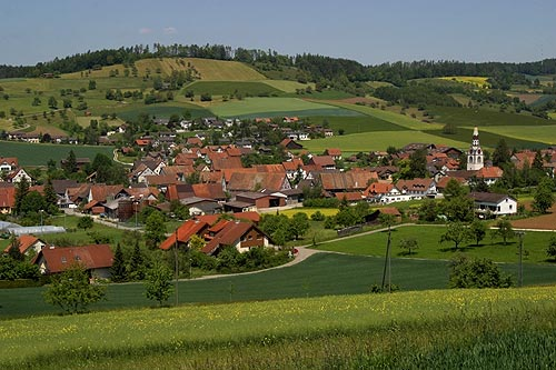 Schleitheim (Nr. 03.1-5333)